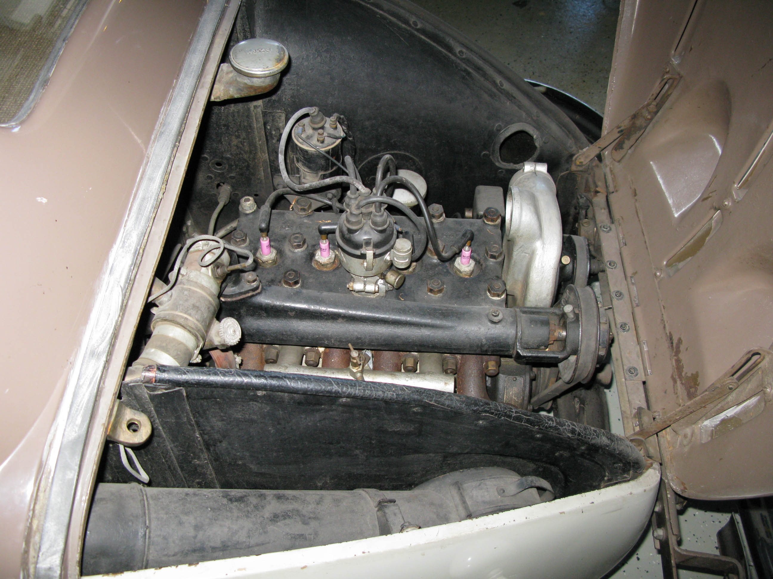 1936 Mercedes-Benz 130